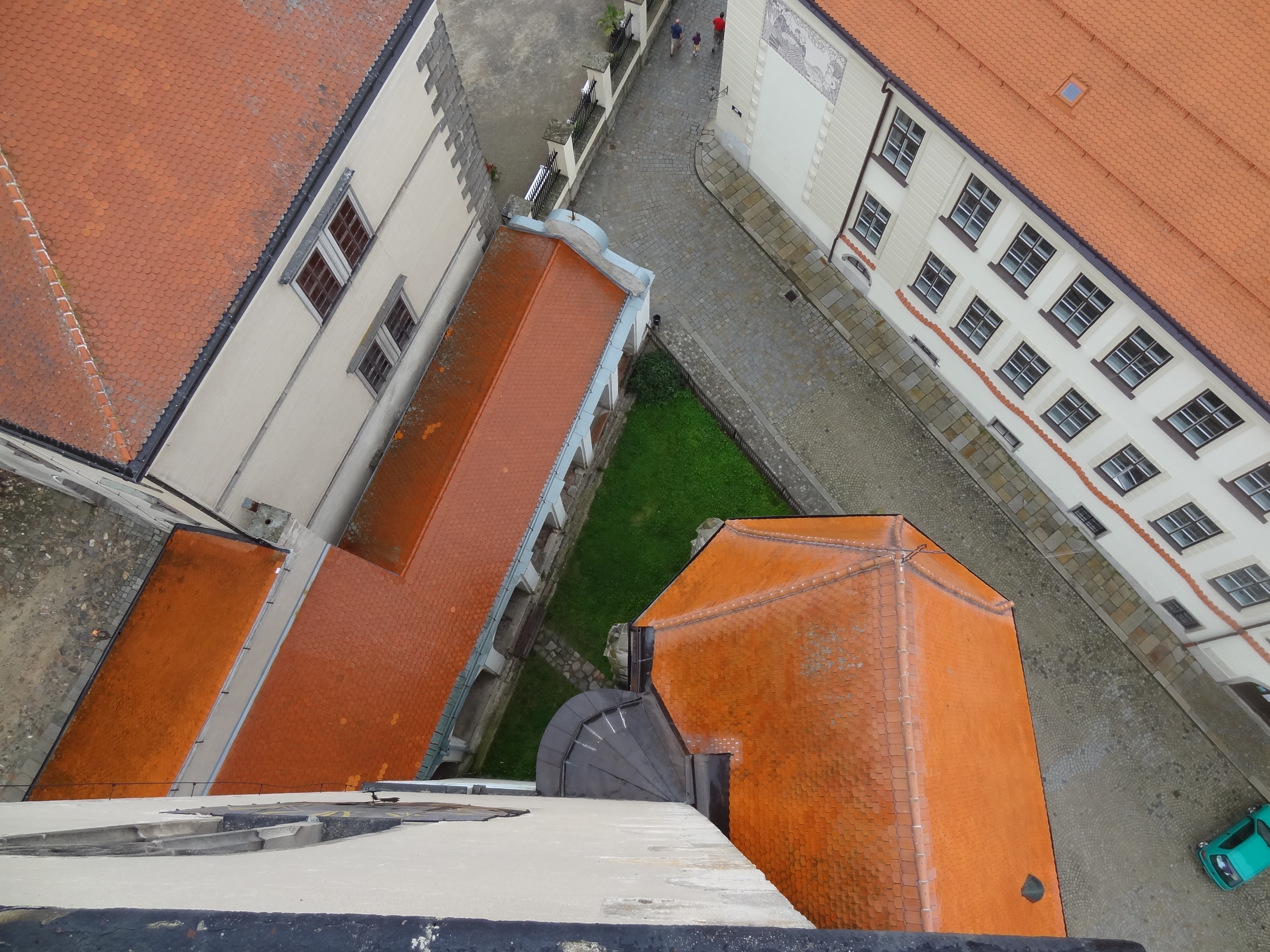 Jezuitský seminář, náměstí Jana Kypty 74, Telč-Vnitřní Město, Telč.